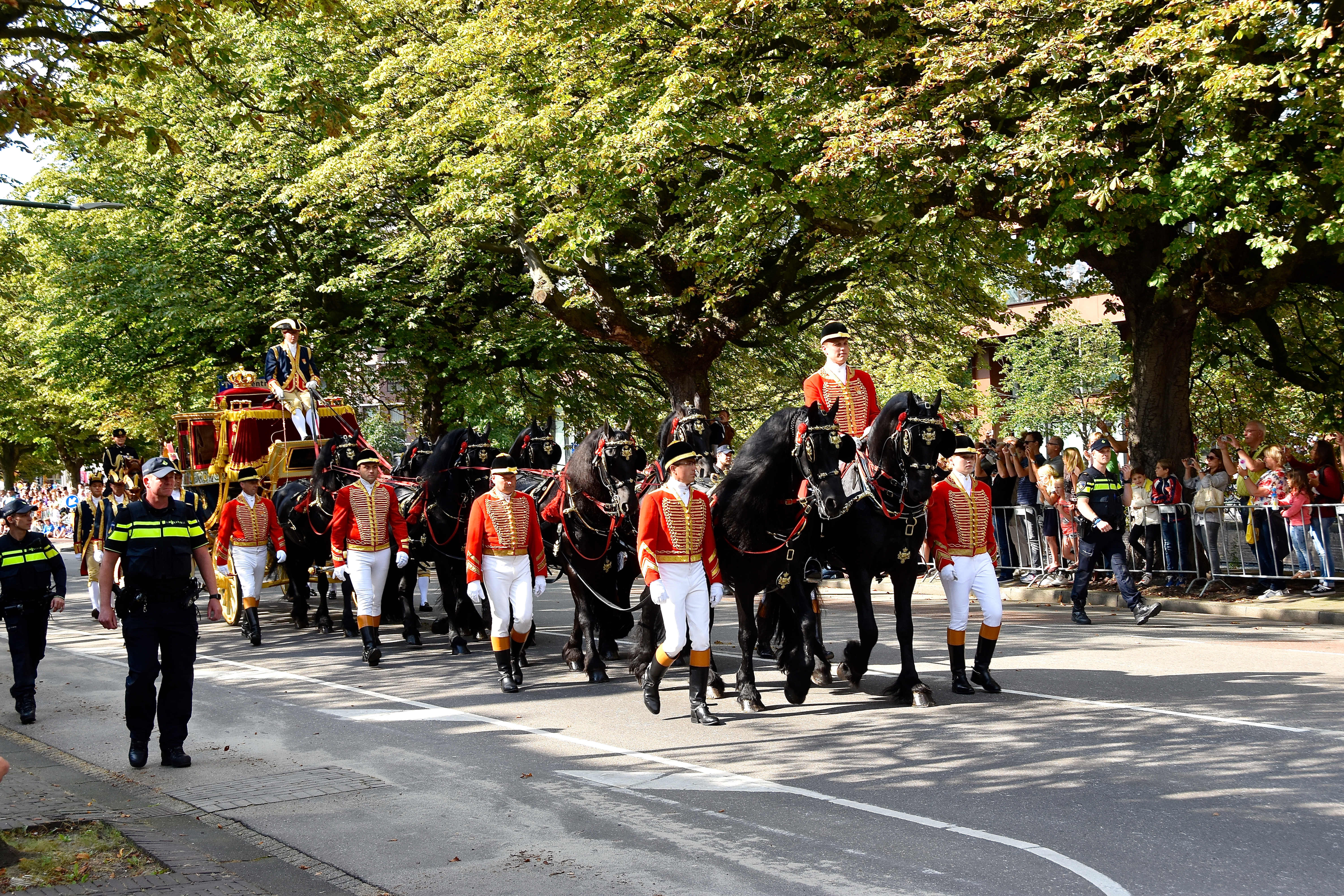 De Glazen Koets is een van de twee gala-berlines van het Nederlandse Koninklijke Staldepartement. De naam van de koets is ontleend aan het glas dat de ornamentenrand beschermen moet. De koets staat in de Koninklijke Stallen in Den Haag. Bron